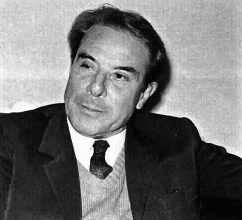 Italian director Renato Castellani